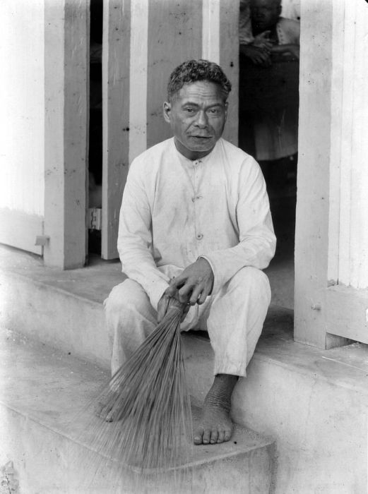 Negatief. De 'emrimo' van Leksoela in Zuid-Boeroe, en tevens conciërge van de zendingsschool